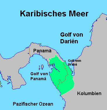 Karte der Darién Lücke